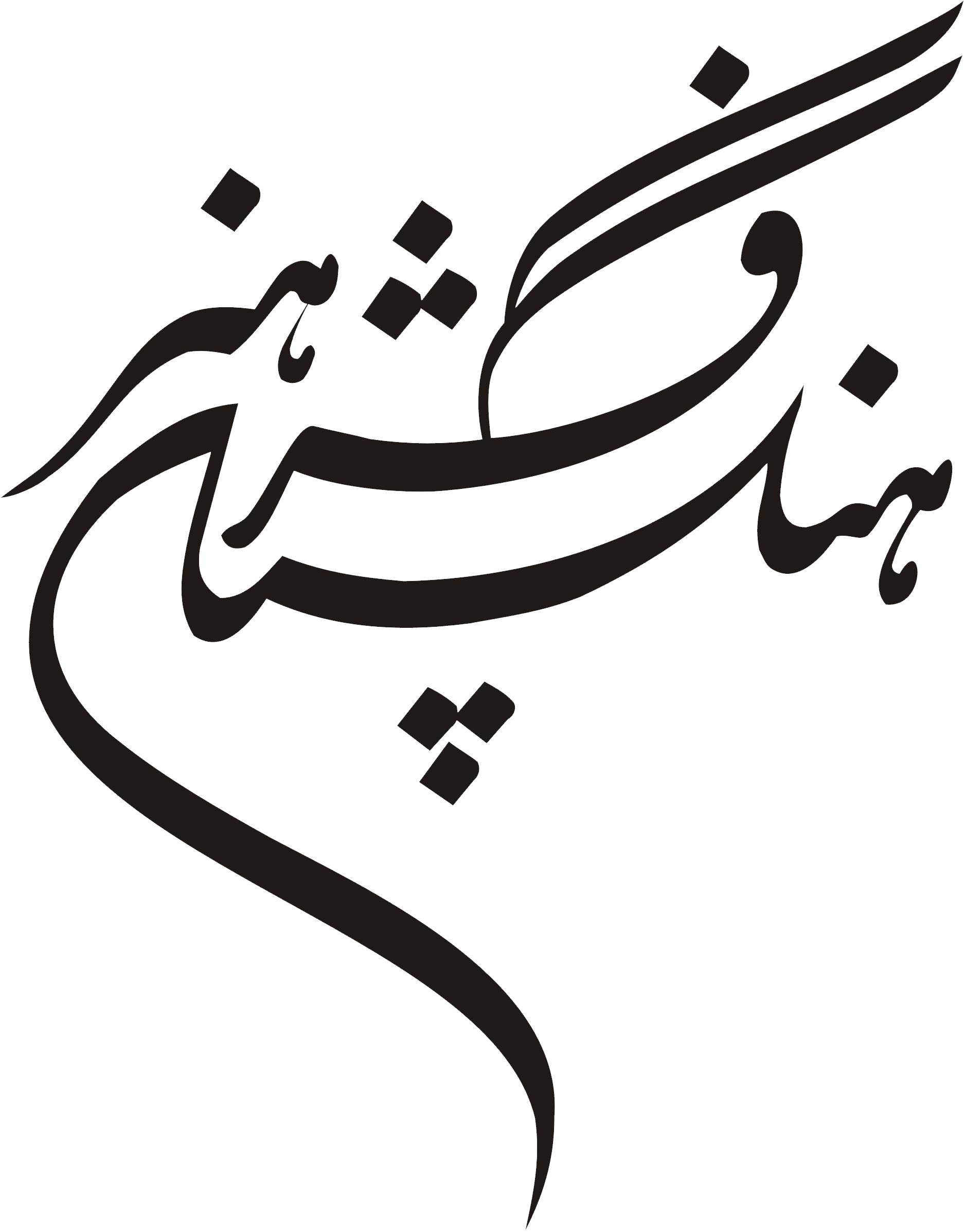 نشان‌وارهٔ فرهنگستان هنر ایران